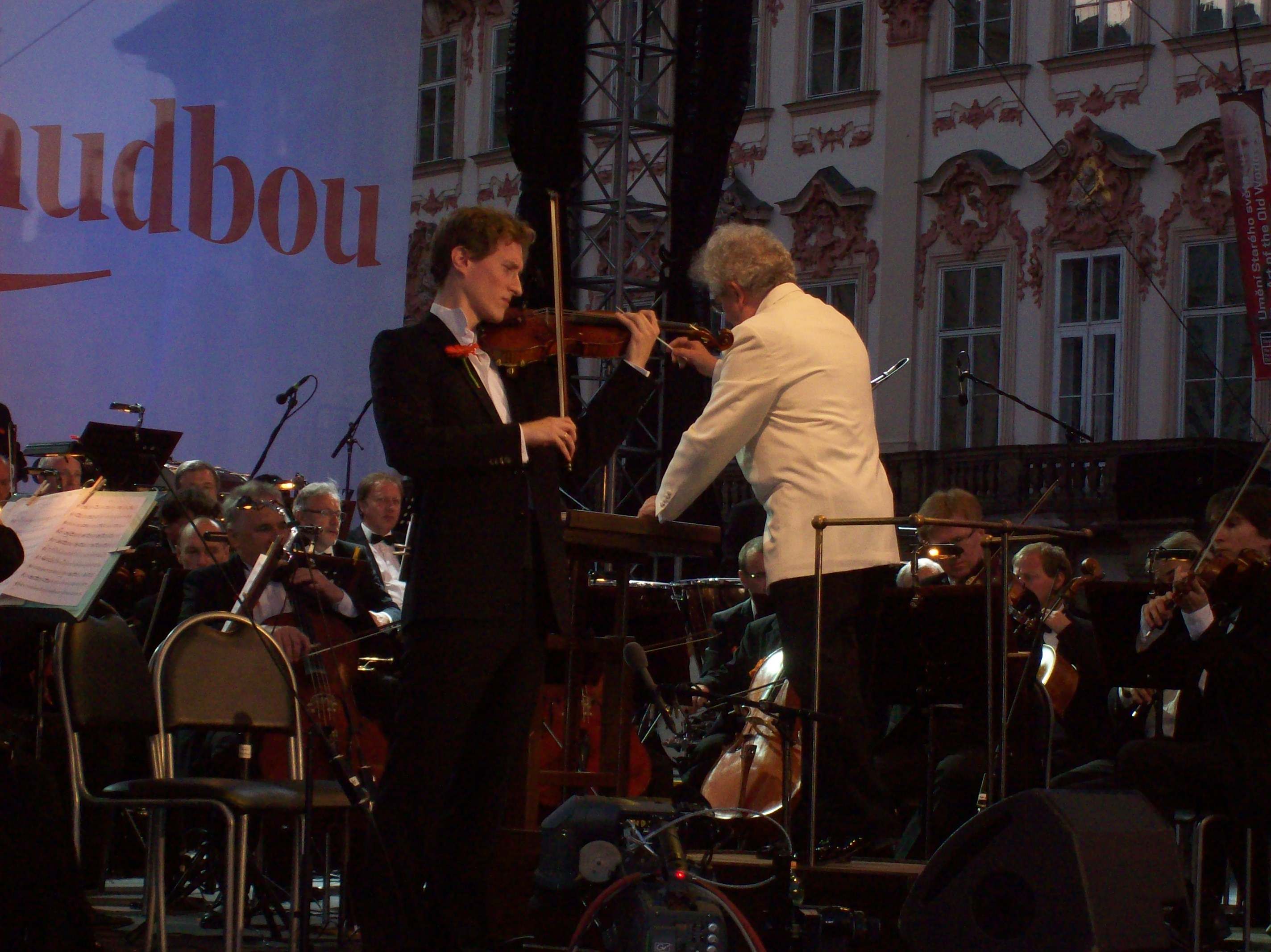 Josef Špaček - housle, Jiří Bělohlávek - dirigent. Česká filharmonie, červen 2013.